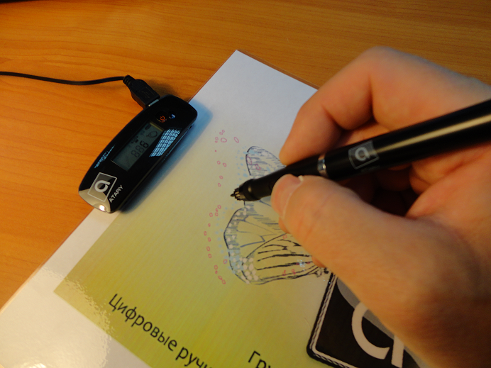 Цифровую координатную ручку можно использовать в качестве графического планшета